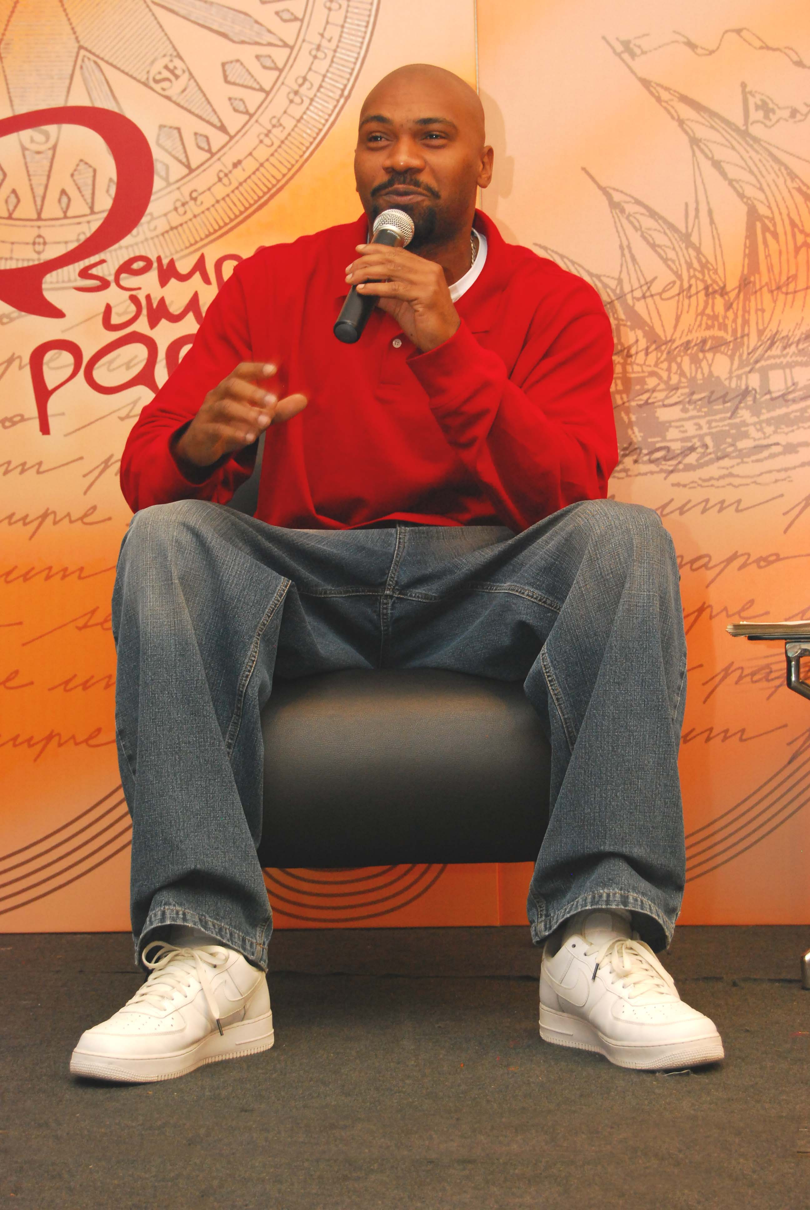 MV Bill